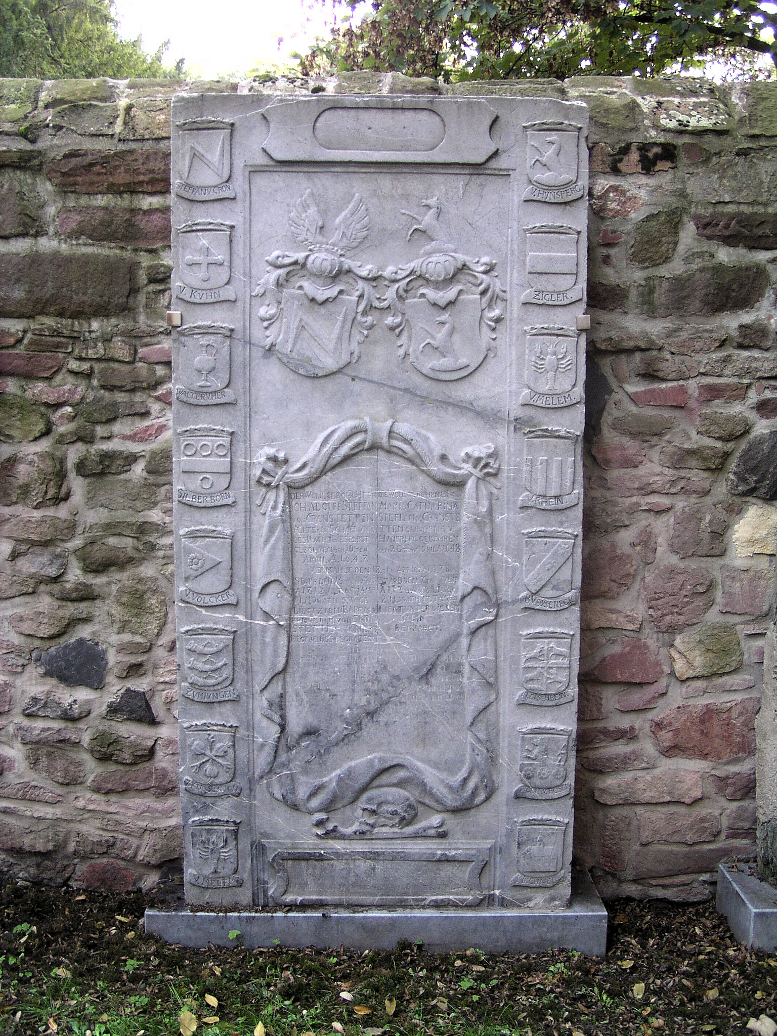 Grabmal derer von Cronstetten, Frankfurter Patrizierfamilie, auf dem Kirchhof der Peterskirche. Justina von Cronstetten (1677–1766) begründete testamentarisch die wohltätige Cronstetten Stiftung, die bis heute Bestand hat.